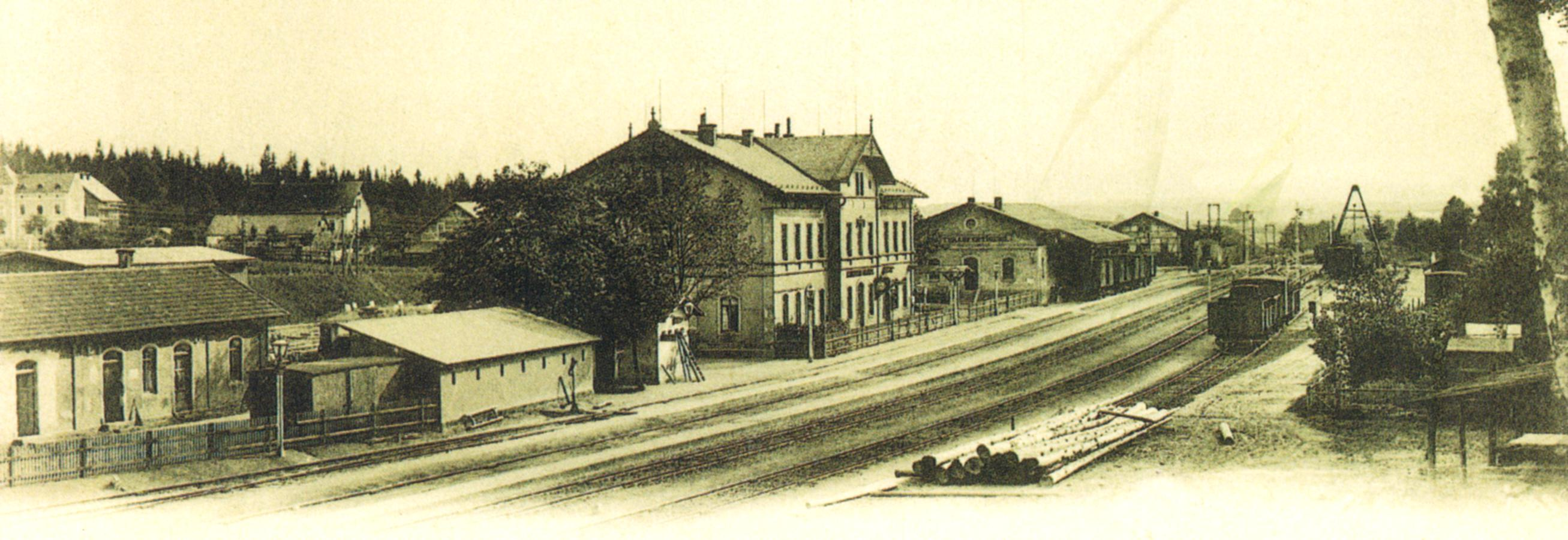 Bahnhof Klingenberg-Colmitz 1898/99